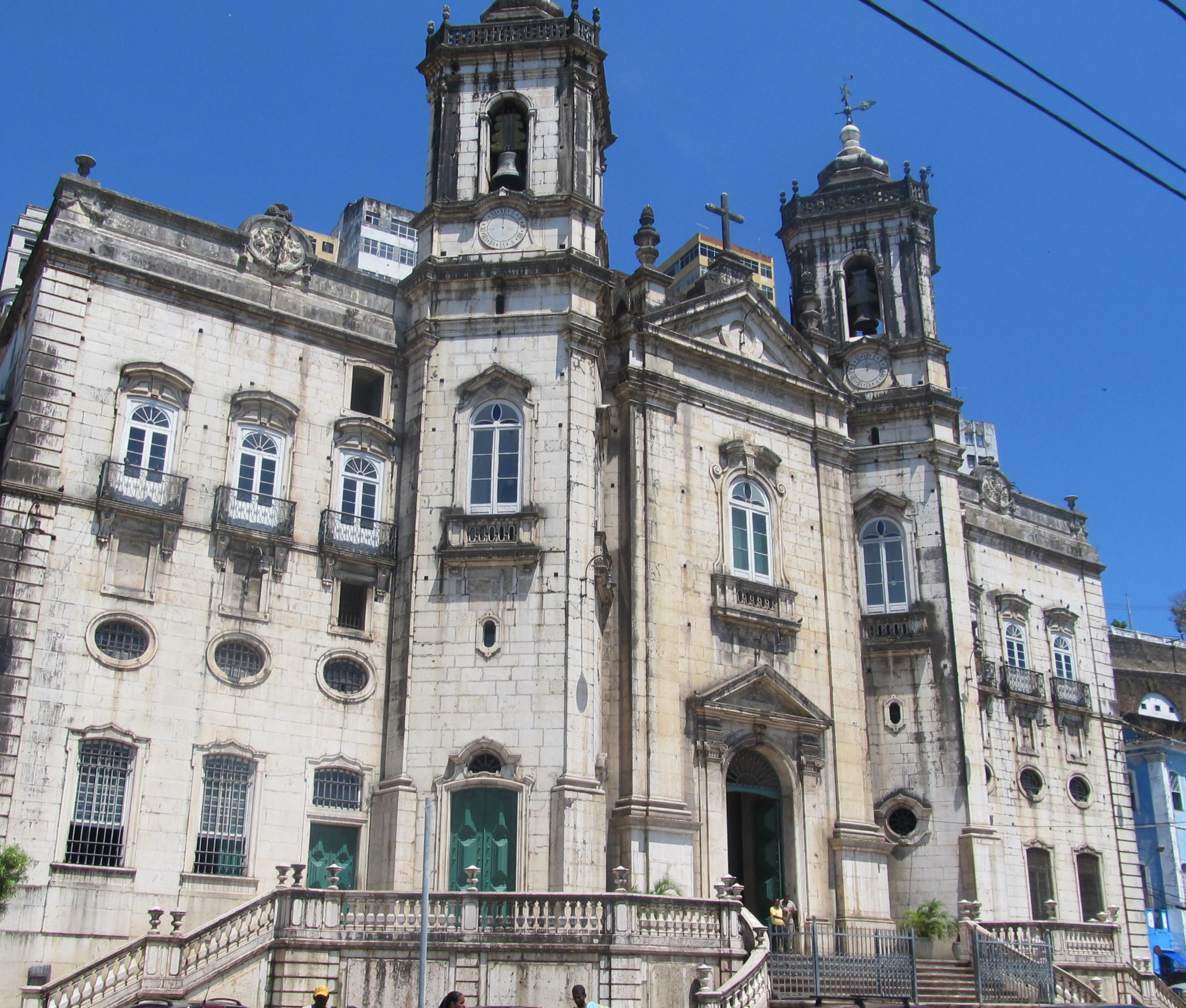 Basílica da Conceição da Praia